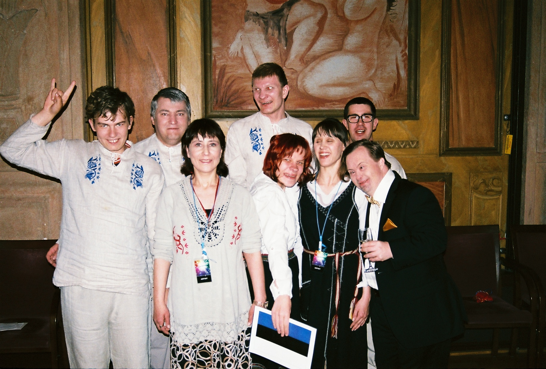 Pilt on tehtud Allikabändist 2. mail 2014 Stockholmi kontserdimajas festivali European Song Festival 2014 ajal.